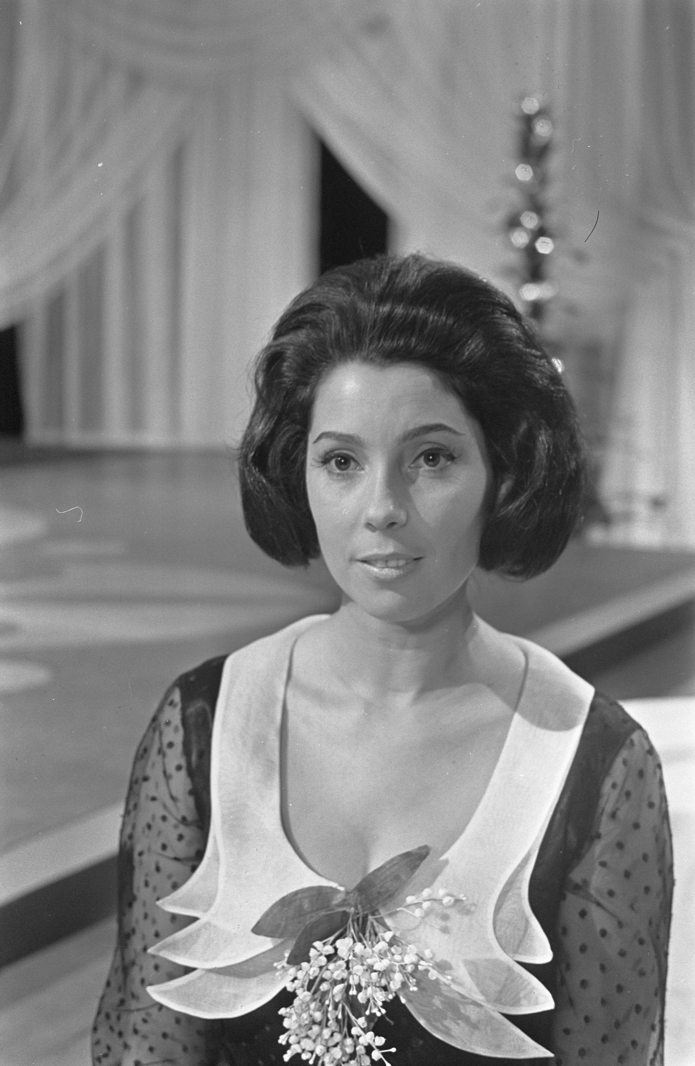 De Corry Brokken show voor tv, Corry Brokken in close-up